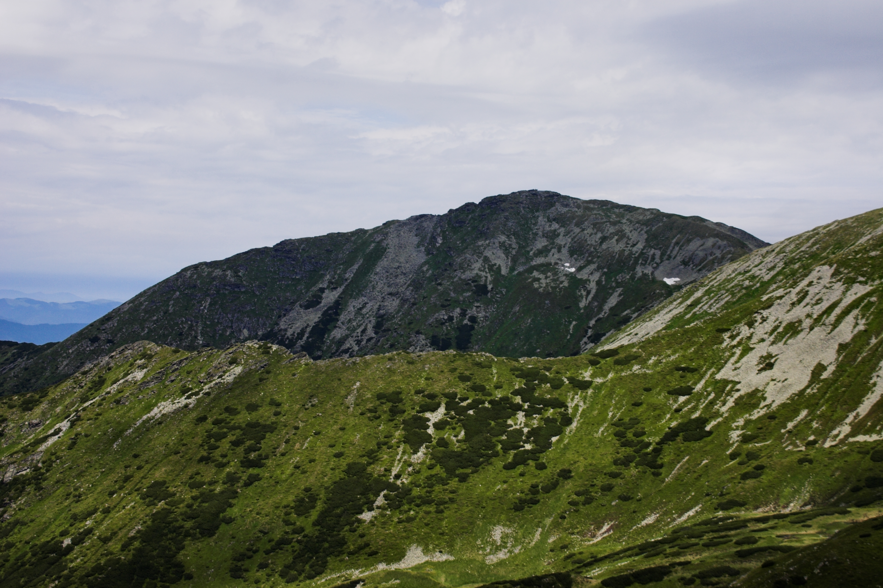 Vârful Pietrosul Rodnei in Rodna Mountains, Romania.